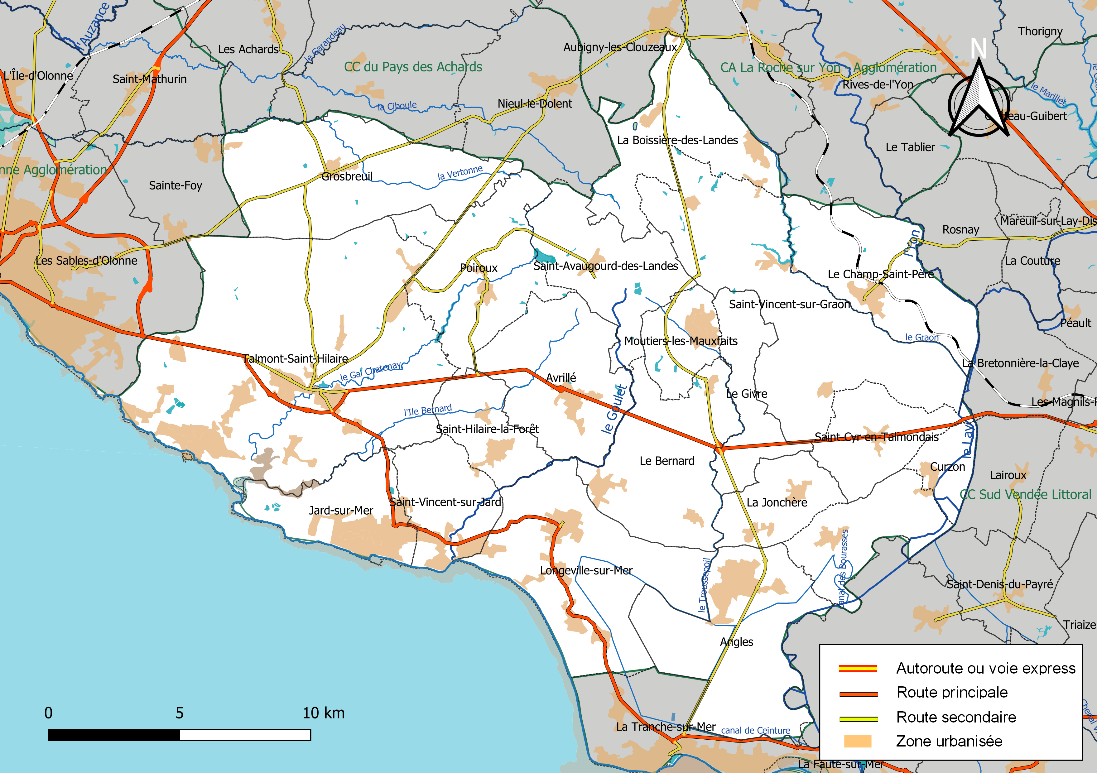 Carte géographique de l'intercommunalité Vendée-Grand-Littoral, département de la Vendée, France. Composition au 1er janvier 2019.